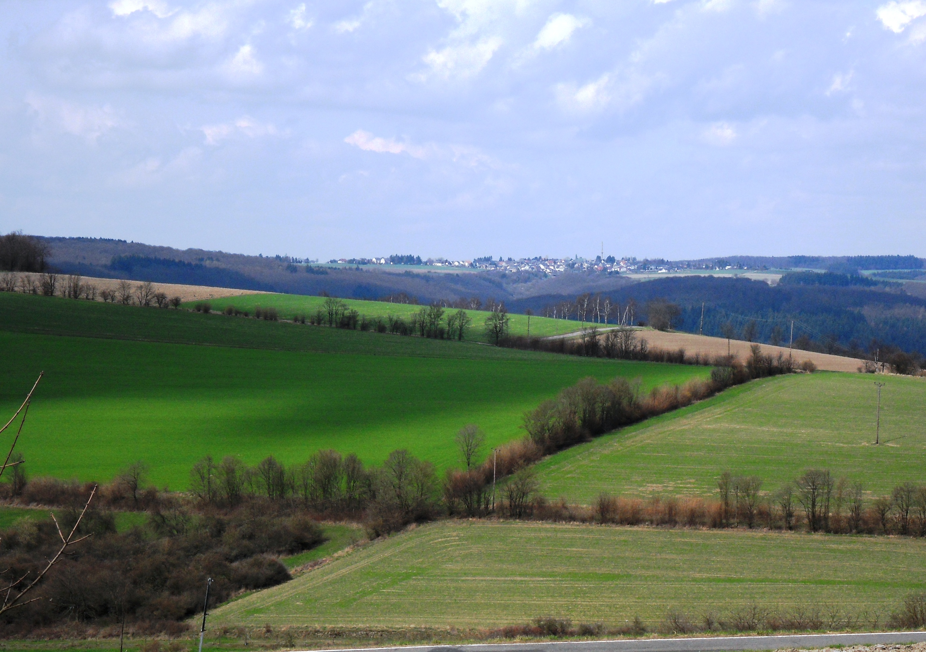 Blick von Presberg nach Nordwesten am unbewaldeten Kerzekopf (407 Meter) vorbei über das tief eingeschnittene Wispertal hinweg auf den 6,5 Kilometer entfernten und 431 Meter hoch gelegenen Lorcher Stadtteil Ransel